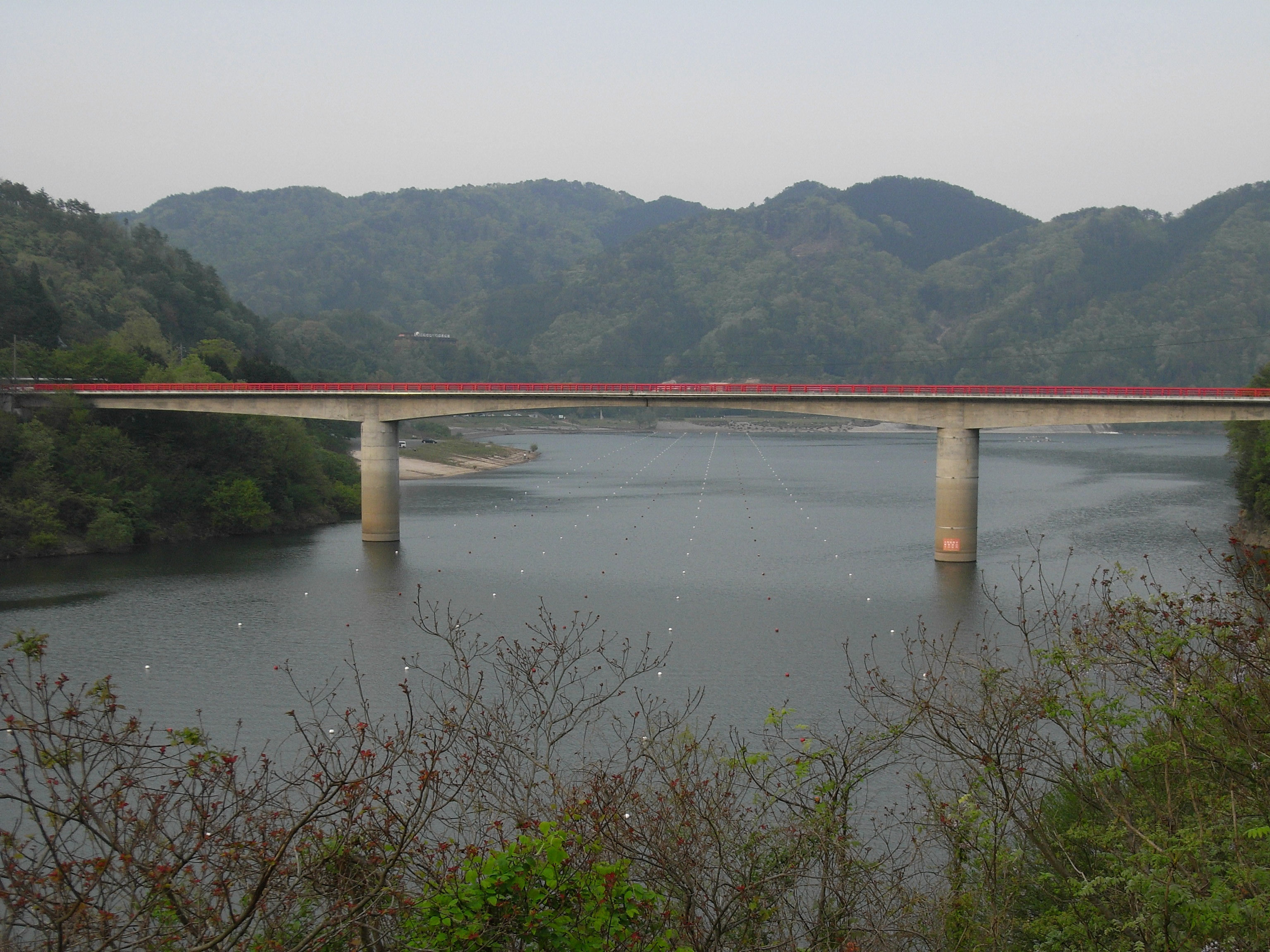 Lake